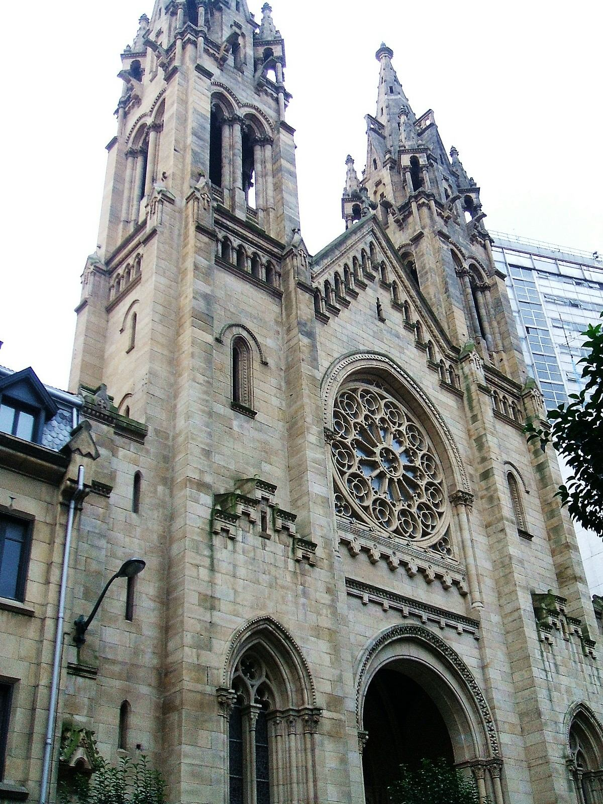 Fachada de la iglesia de San Francisco de Asís, Bilbao